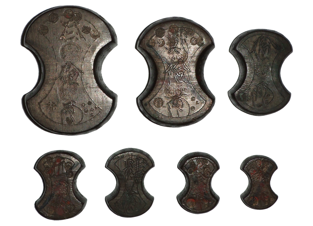 後藤分銅の画像. 江戸時代に両替商が用いた後藤分銅 參拾兩(1124.27g)、貳拾兩(749.45g)、拾兩(374.40g)、伍兩(187.45g)、肆兩 (149.89g)、參兩(112.46g)、貳兩(75.01g)